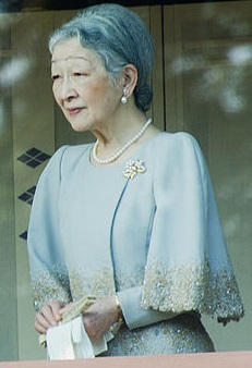 日本天皇明仁與皇后美智子。